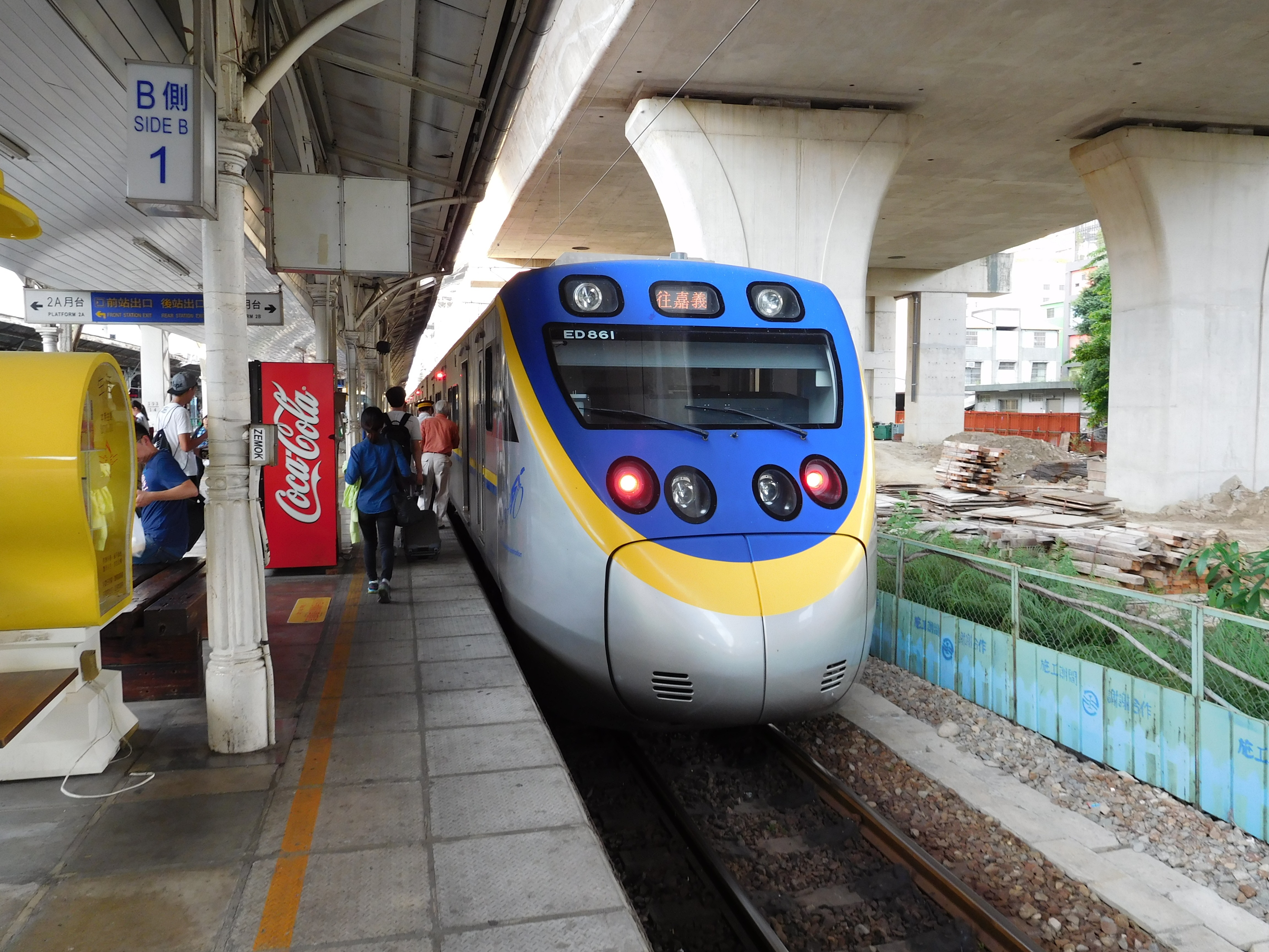 中文（台灣）: 臺灣鐵路管理局EMU800型電聯車EMU861，停靠臺中車站。